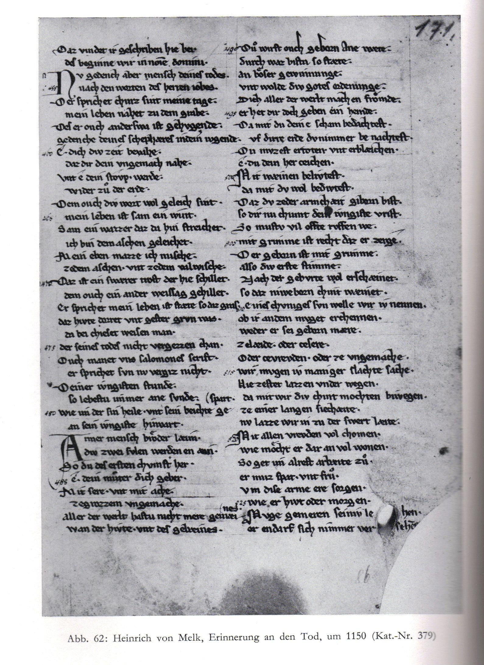 Wien, Österreichische Nationalbibliothek Cod. 2696, Bl. 86r: Heinrich von Melk, Erinnerung an den Tod (Memento mori)